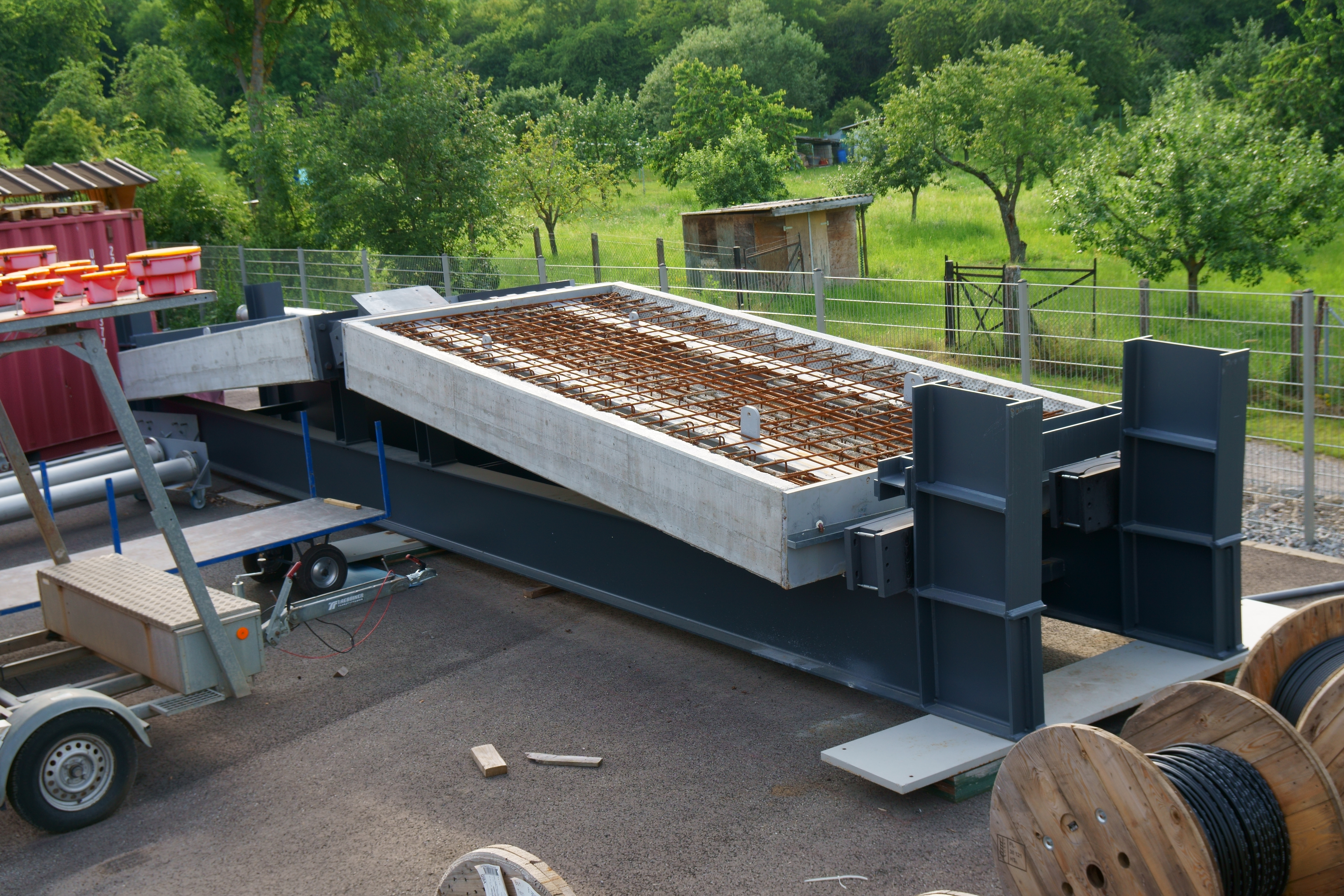 Engelbergtunnel Nordportal